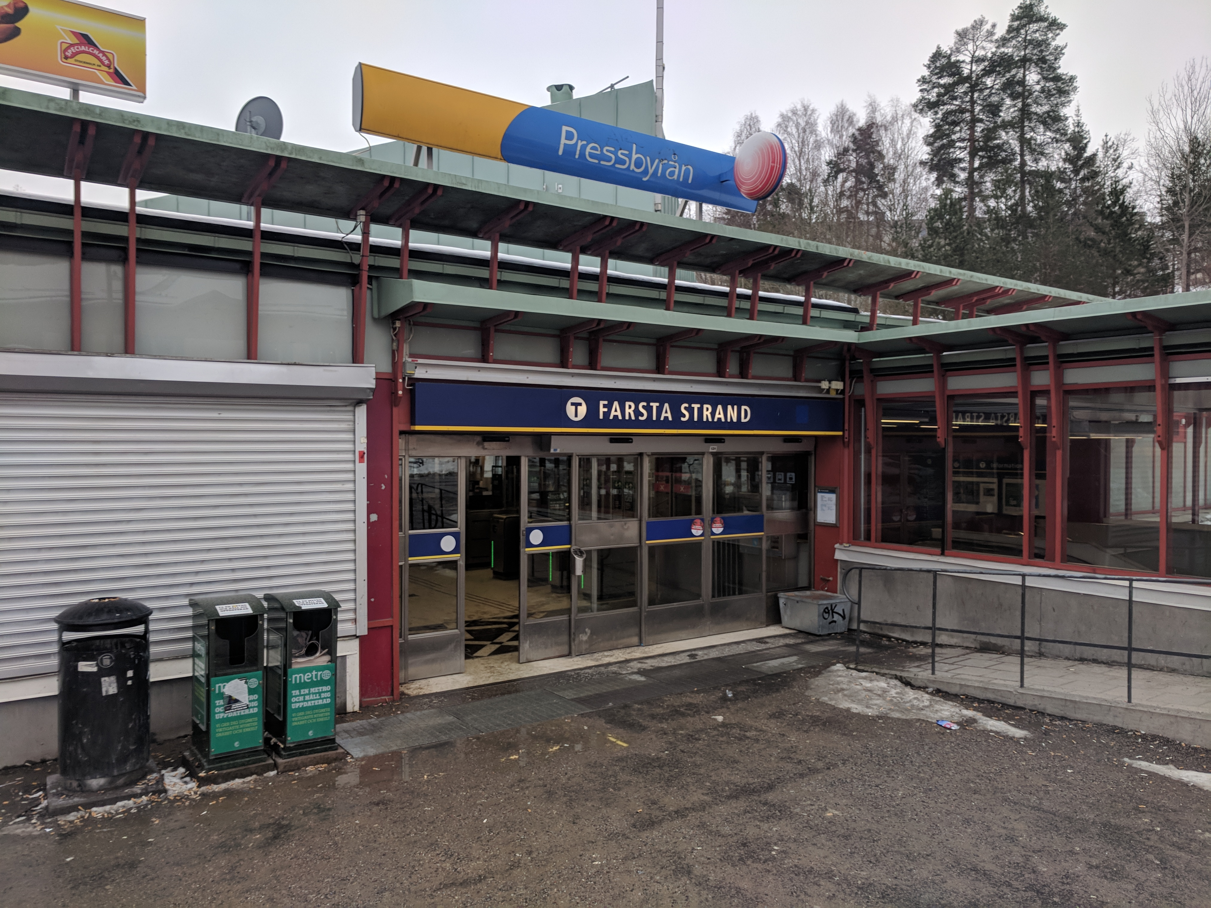 Farsta Strand T-banan